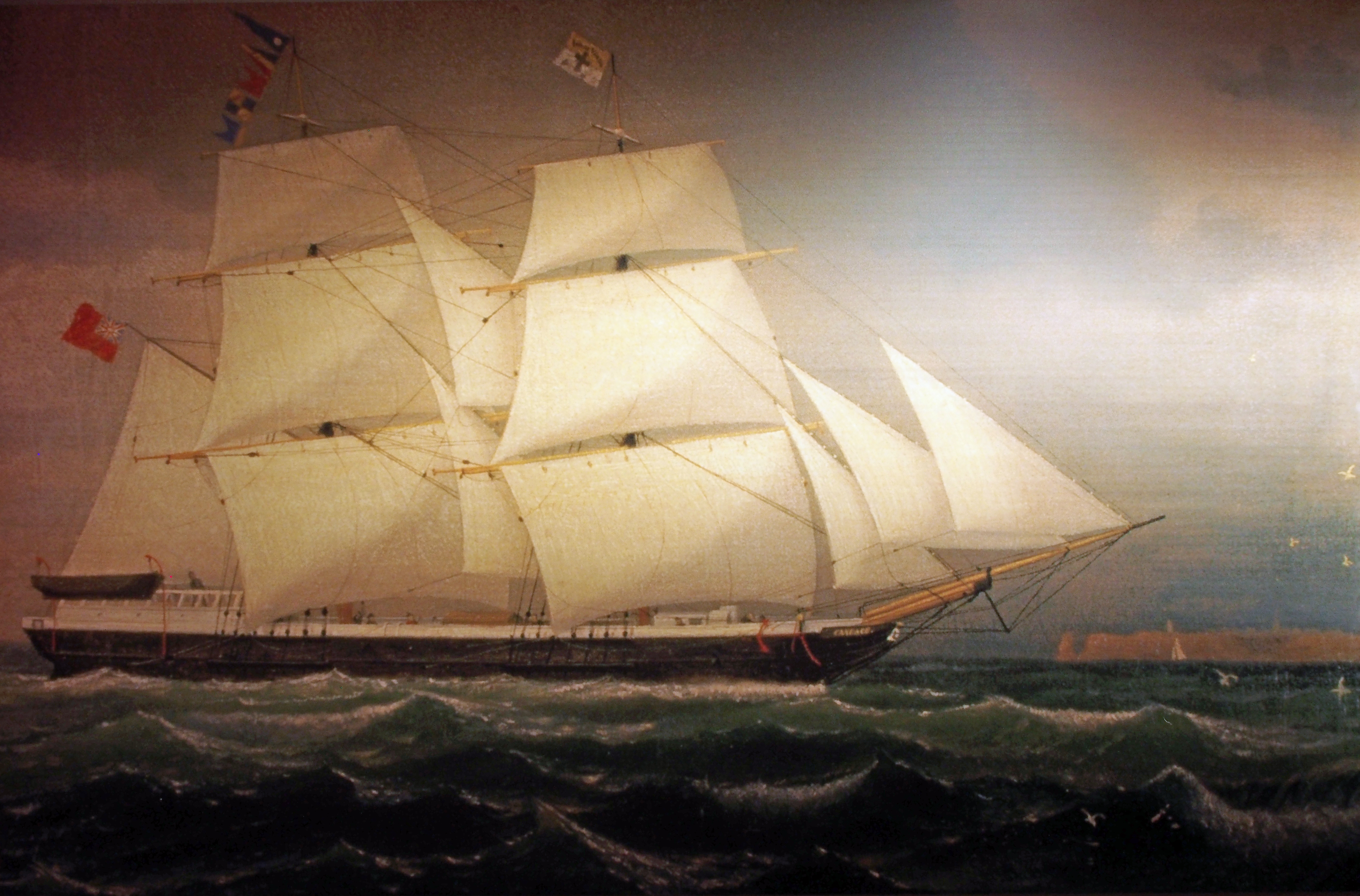 Das Missionsschiff Candace vor Helgoland